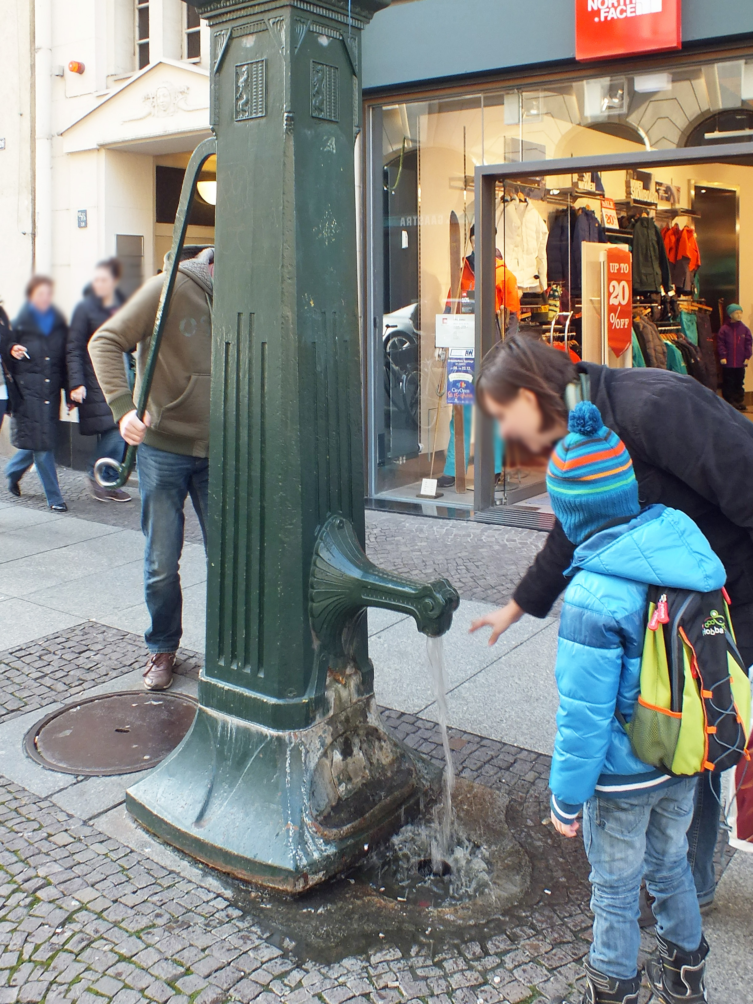 Restaurierte Handschwengelpumpe am Neumarkt in Leipzig in Funktion